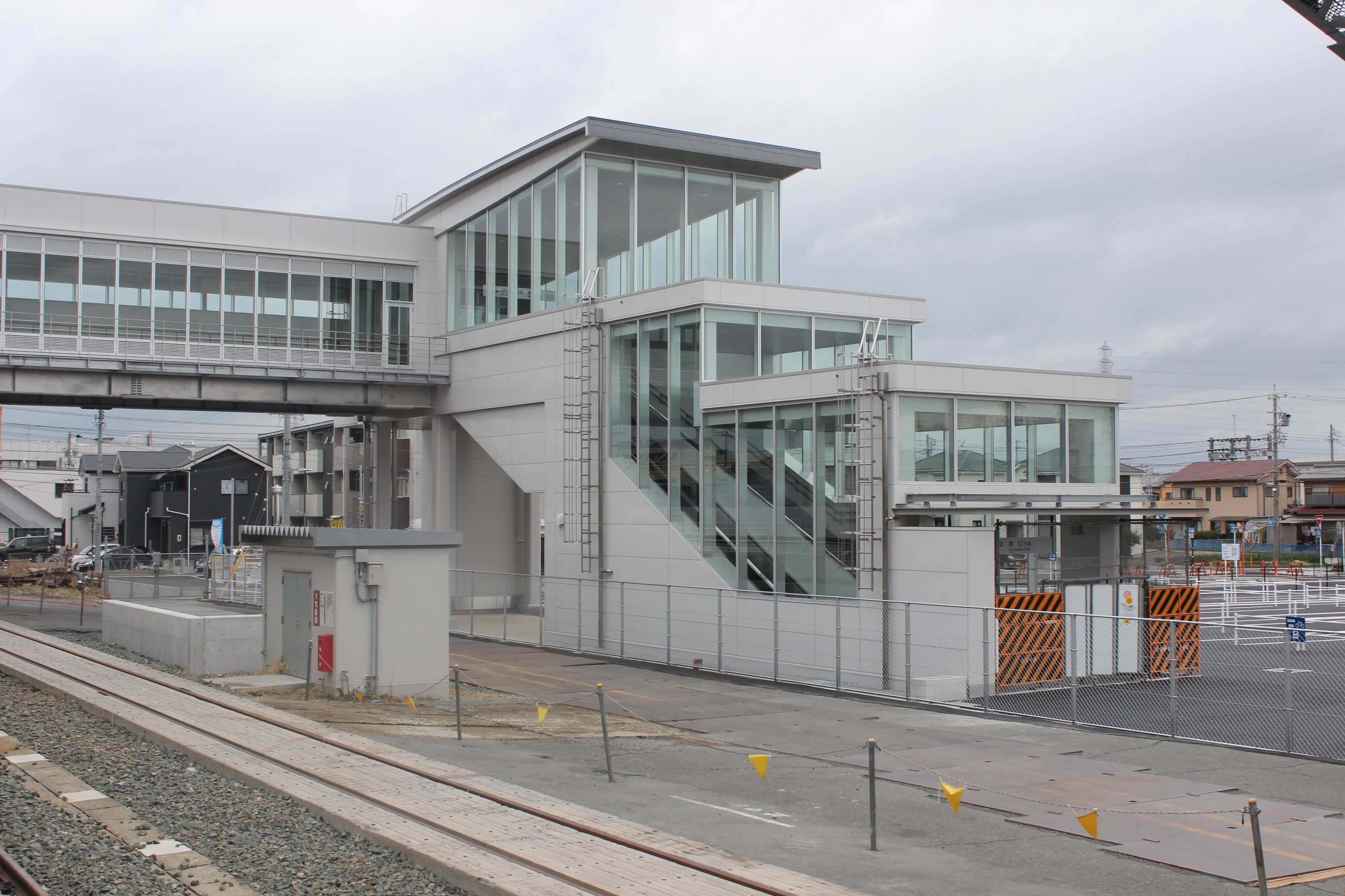 高塚駅新駅舎